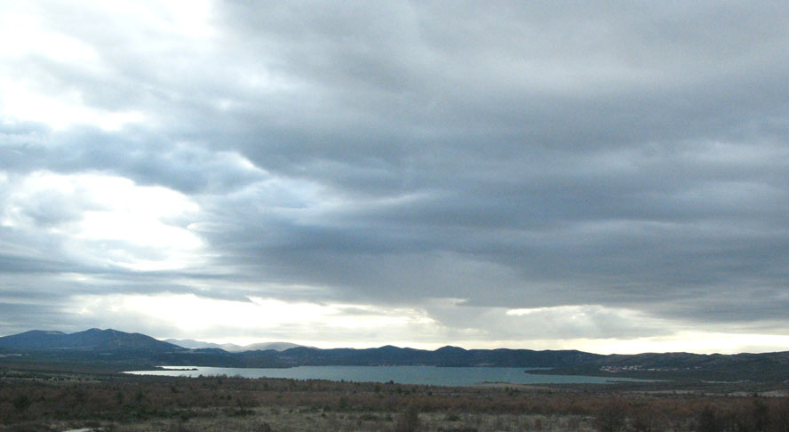 Prokljansko jezero